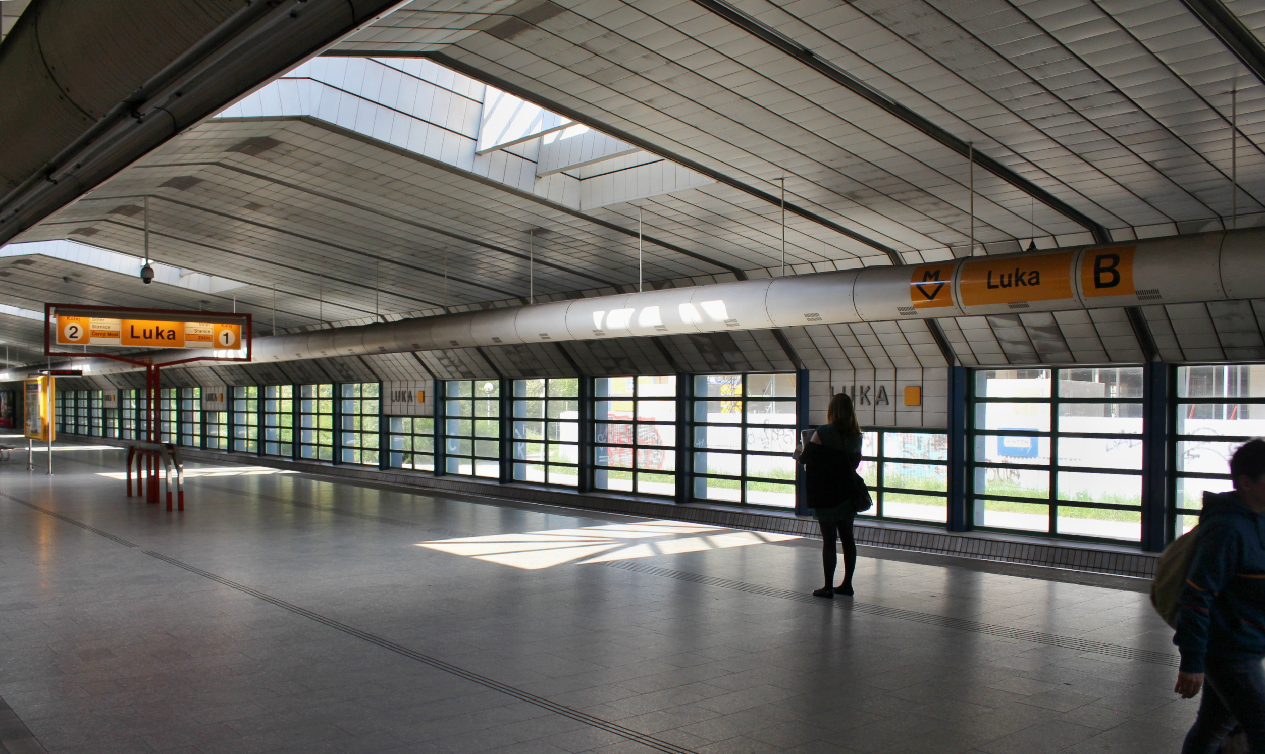 Stanice pražského metra, trasa B, Luka